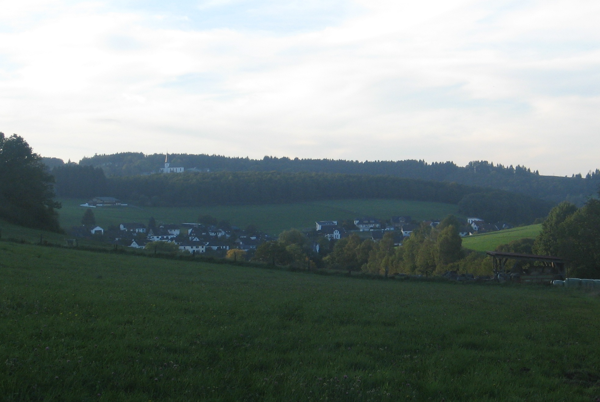 Wilnsdorf-Oberdielfen vom oberen Dielfetal aus gesehen, im Hintergrund auf der Höhe links die Rödger Simultankirche.